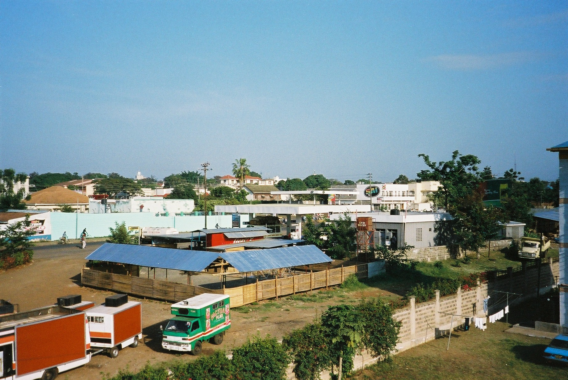 Kenya - Kisumu - Mayfair Estate - Salle de fête itinérante pour projection cinématographique et soirée dansante.